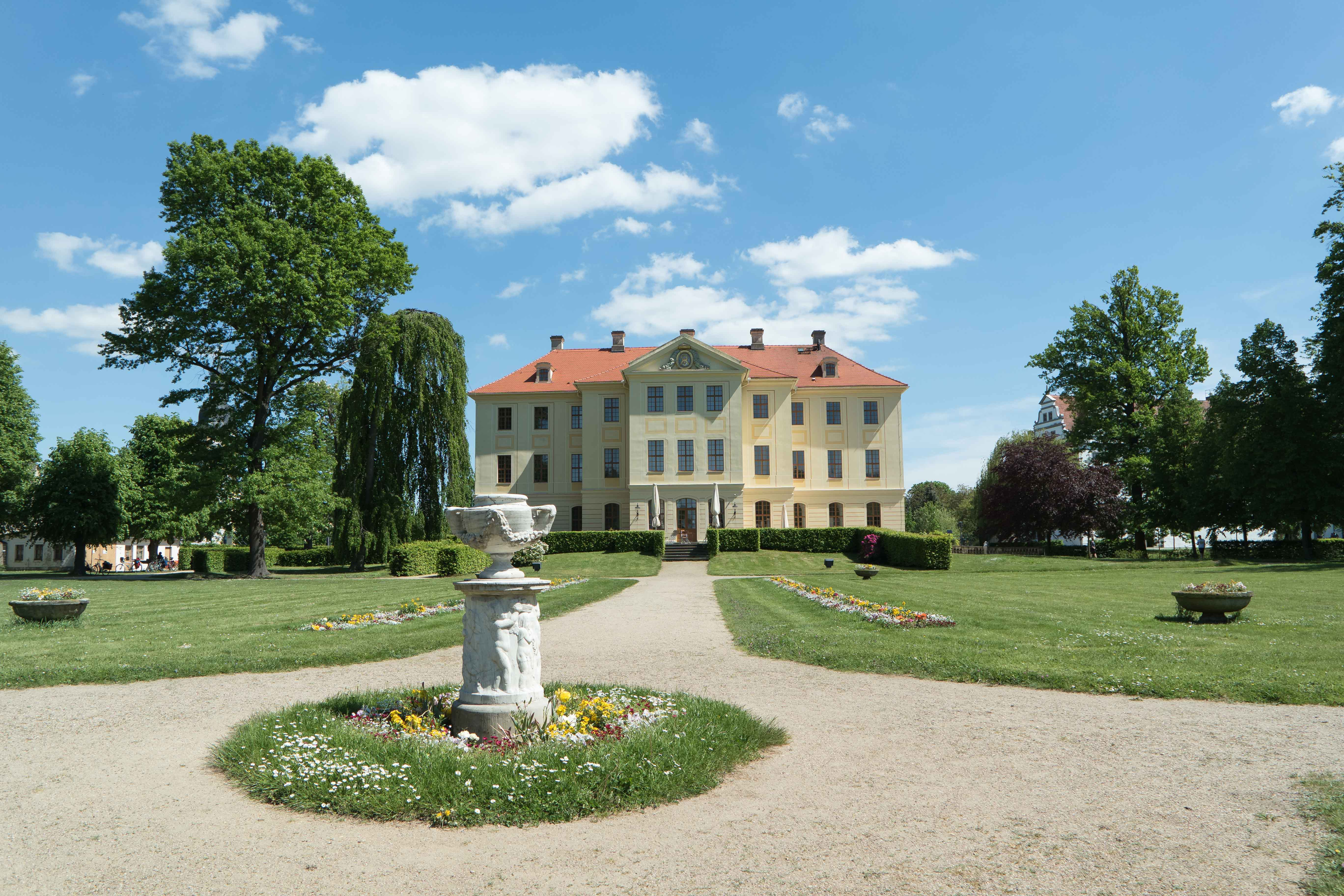 Barockgarten und Palais Zabeltitz